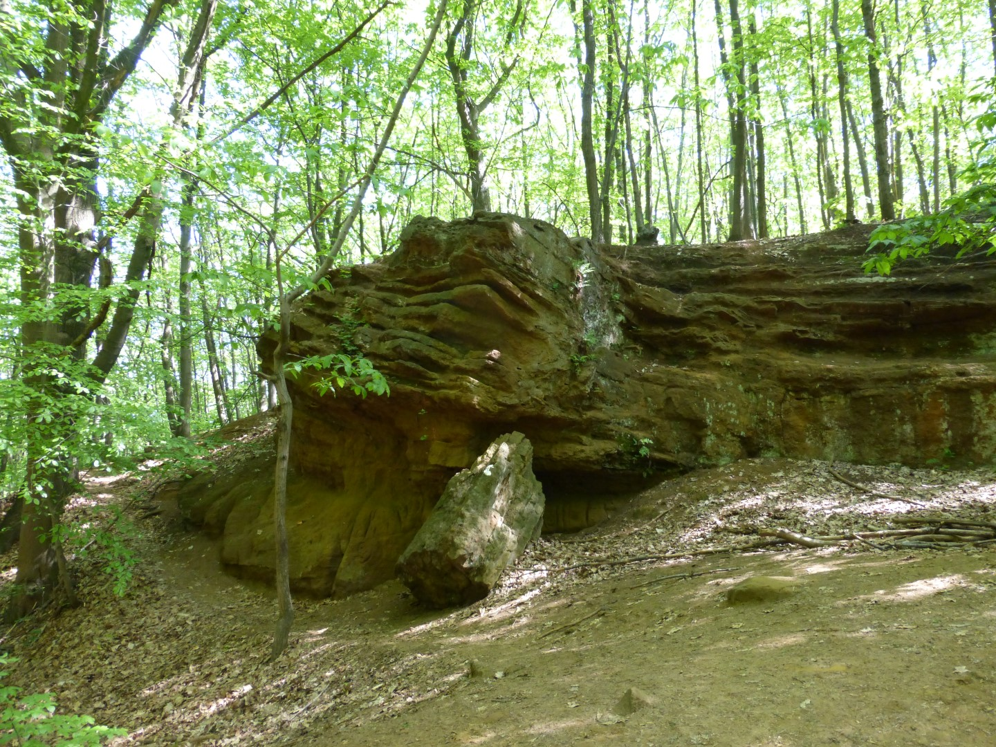 Ijzerzandsteengroeve nabij Heilig-Hartbeeld, Rotselaar, Wezemaal(3)